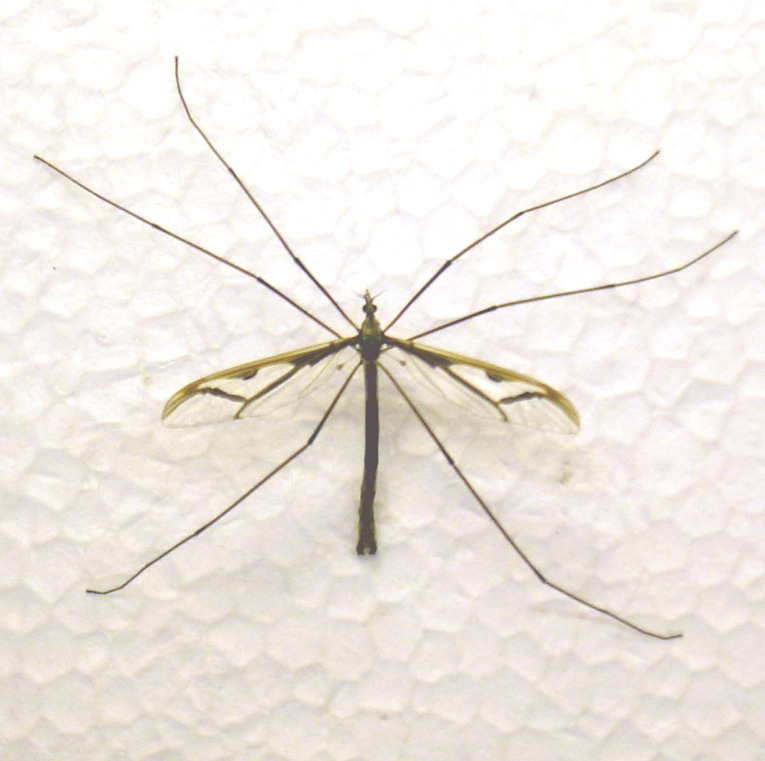 Pedicia rivosa (Pediciidae, Diptera) (earlier: Limnoniidae)